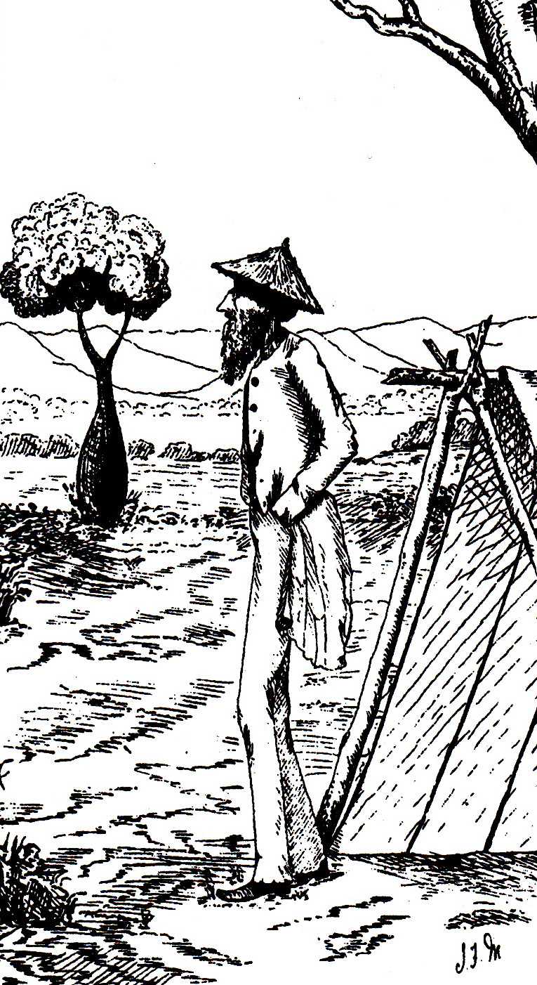 Zeichnung von Leichhardt durch John Frederick Mann Ludwig Leichhardt-Picture, designed from John F. Mann